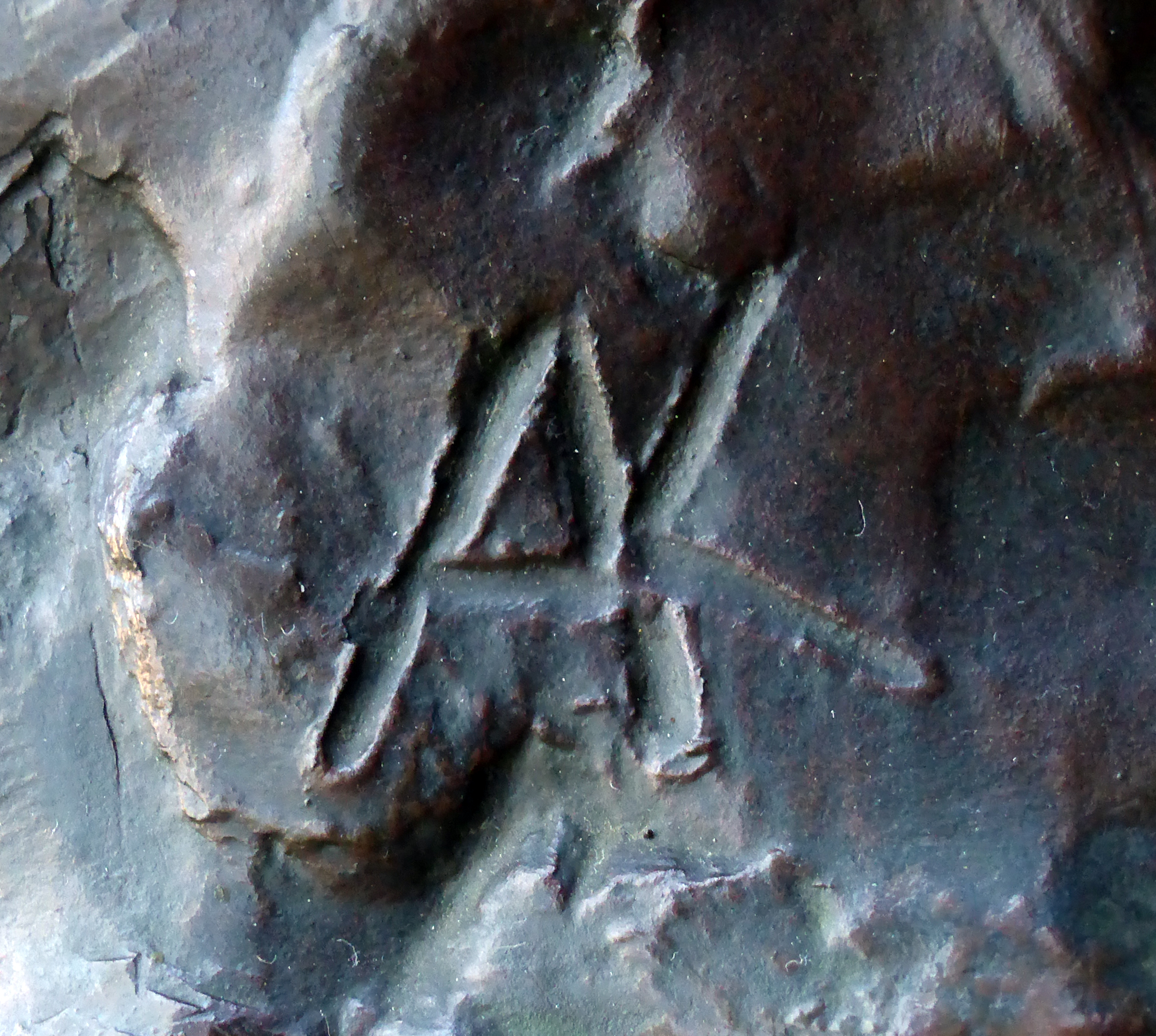 Bronzebüste Paul von Breitenbach vom Bildhauer August Kraus von 1920. Ausgestellt im Deutschen Technikmuseum in Berlin. Inventarnummer: 1/2009/0772. Wikipedianische KulTour am 10. Oktober 2015 in der Ausstellung des Museums.